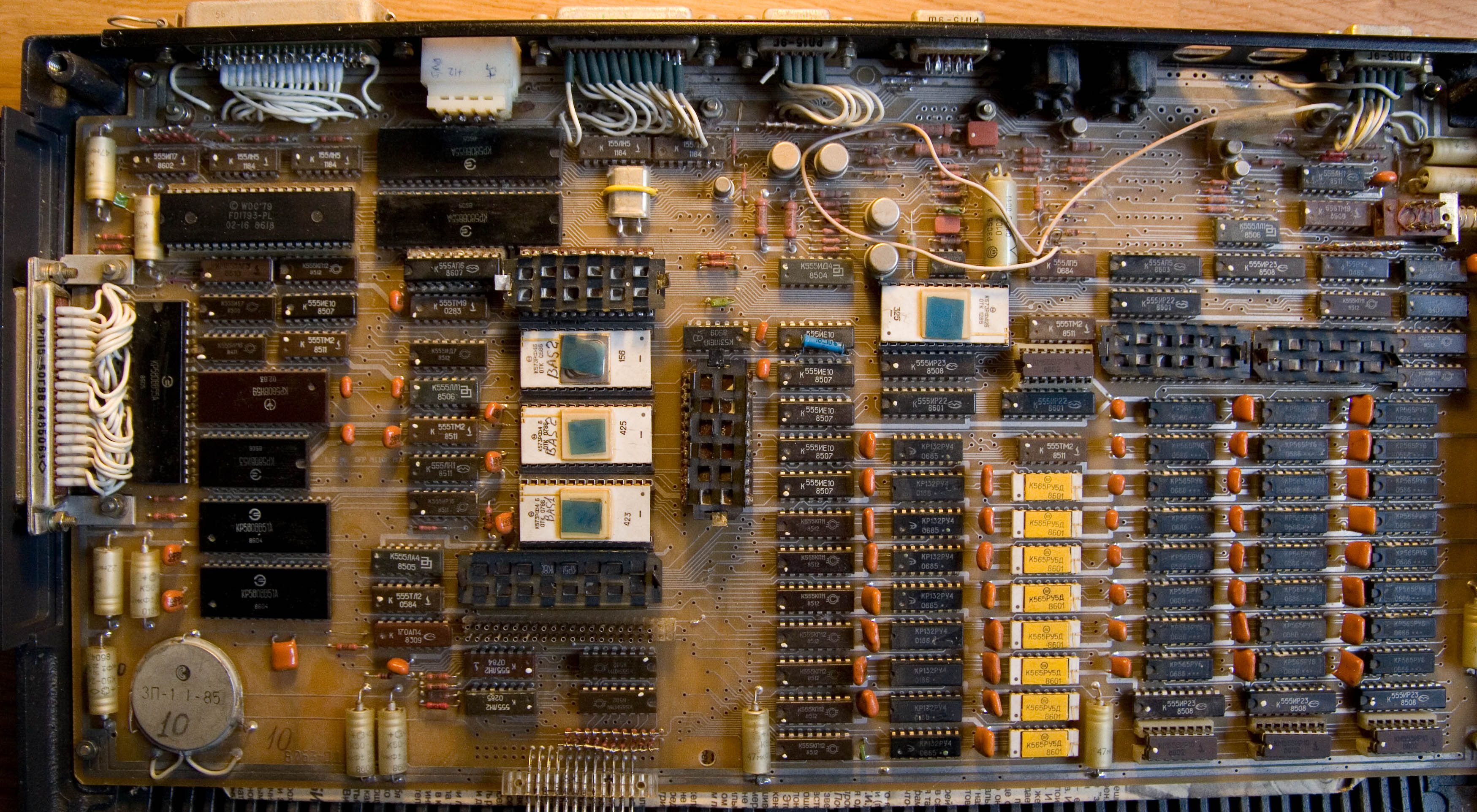 Korvet PCB